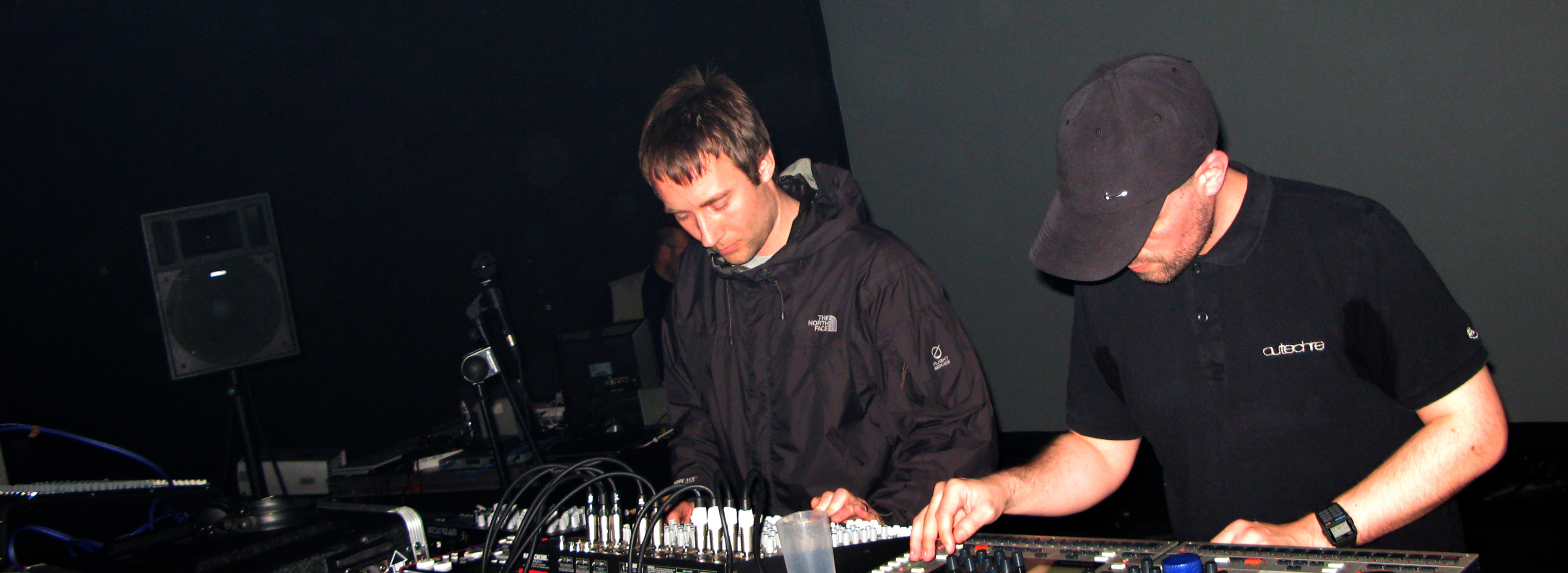 Autechre